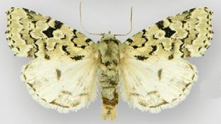 Bryolymnia viridata male